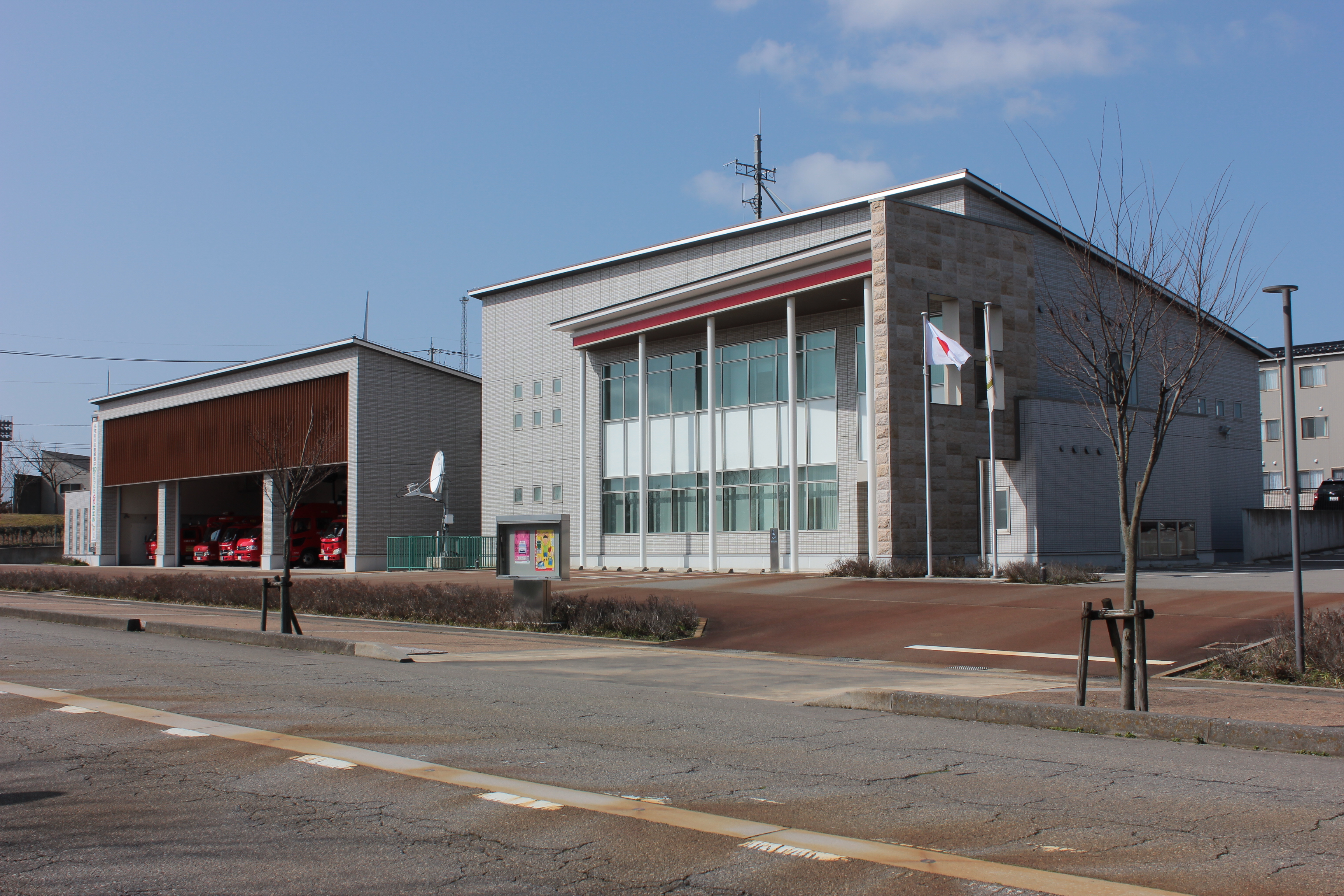 内灘町消防本部（石川県河北郡内灘町） Canon EOS Kiss X5